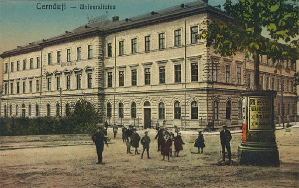 перший будинок Чернівецького університету (Університету імені Франца Йосифа)